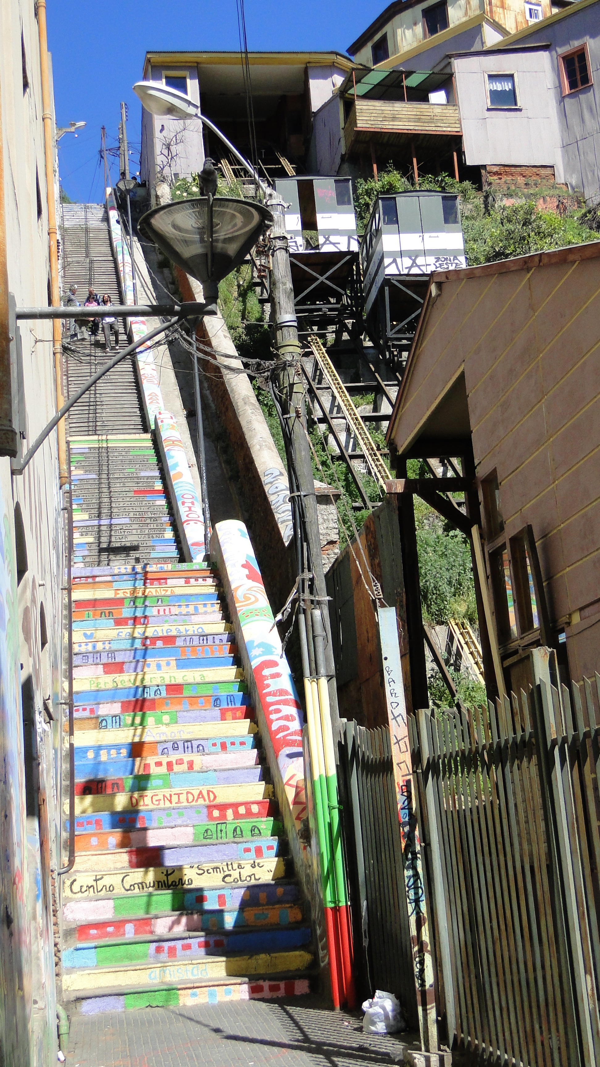 Ascensor Cordillera-Escala Lateral This is a photo of a national monument in Chile: 774